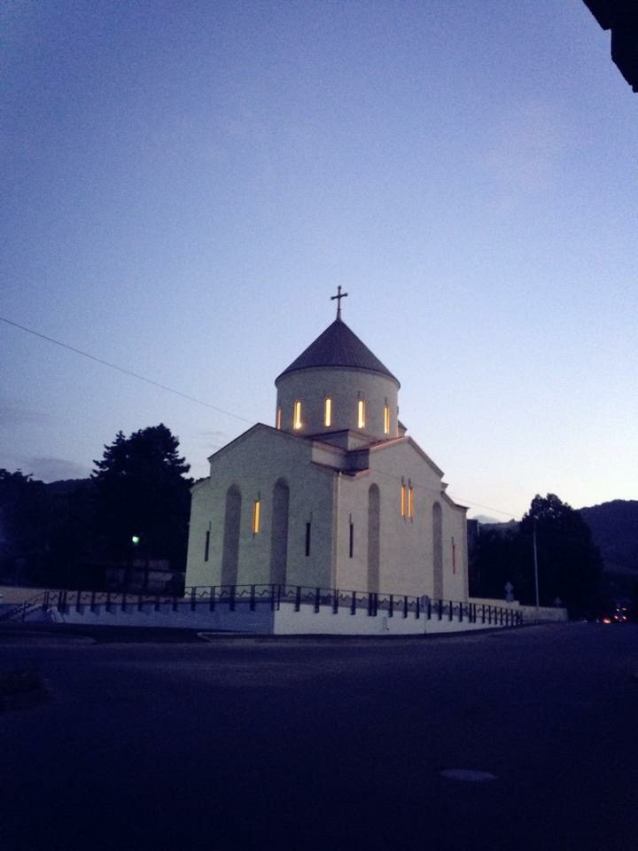 Սուրբ Հովհաննես եկեղեցի